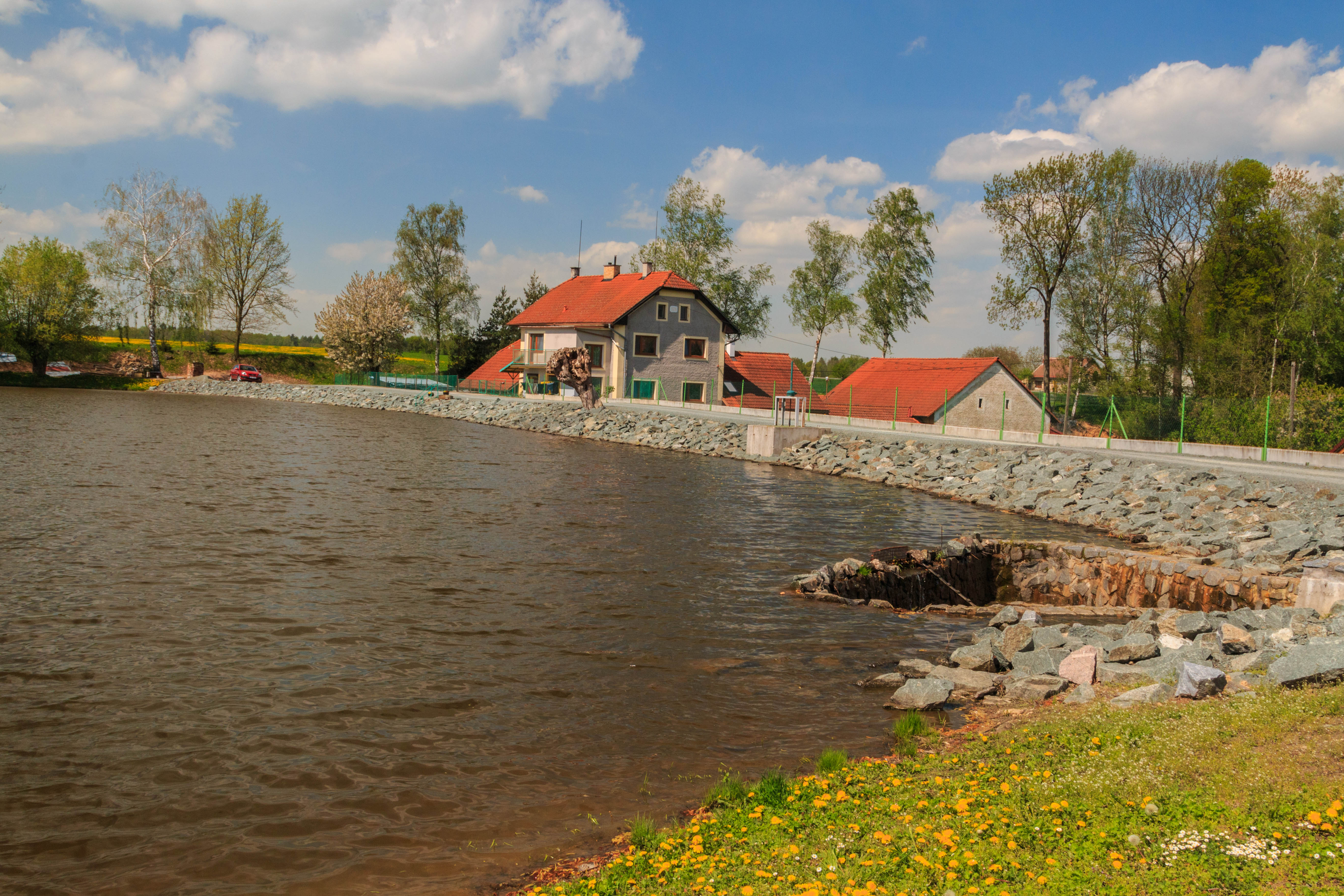 Stojický rybník Project: Vodstvo.